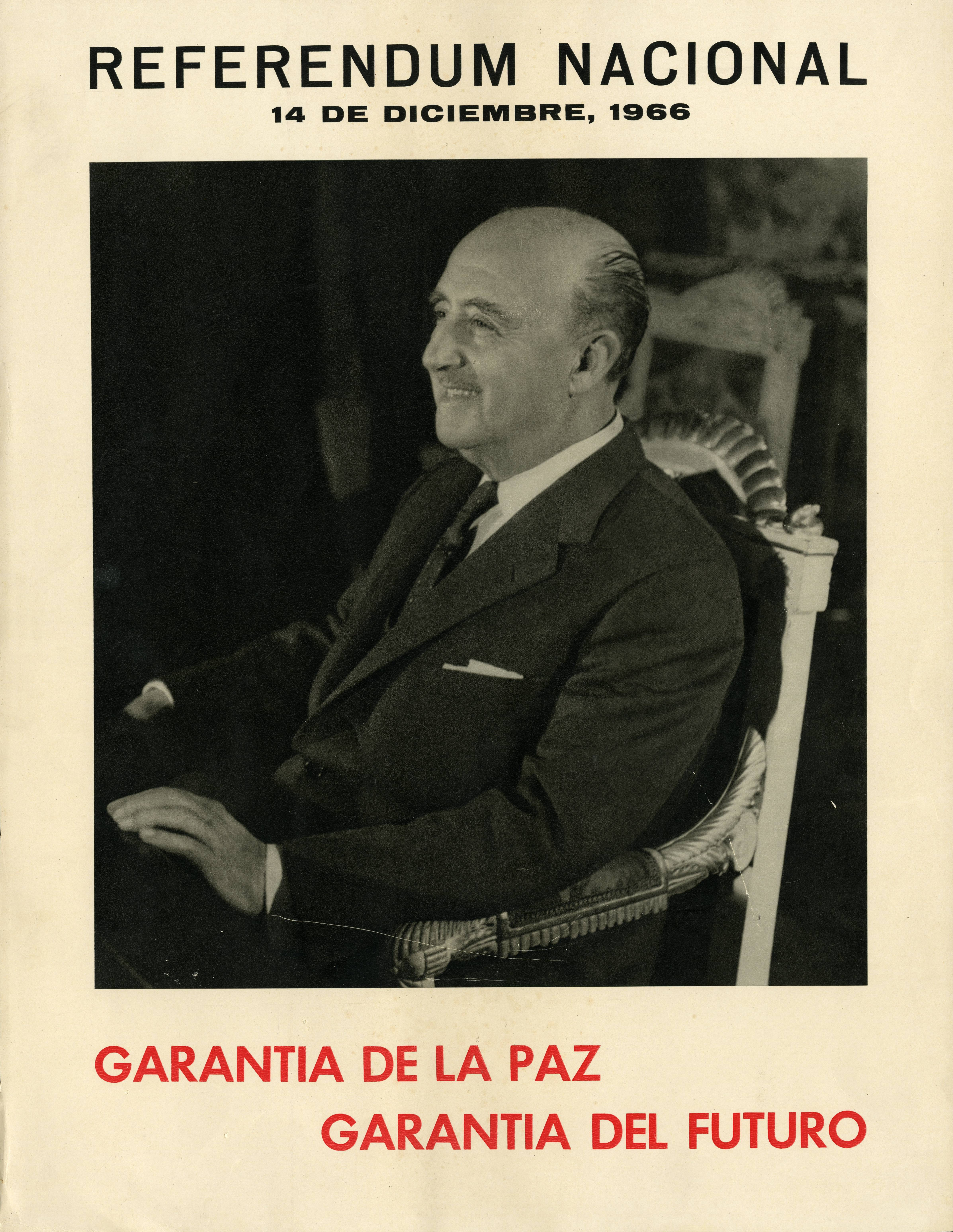 Cartel del referendum nacional de 1966 con foto del general Francisco Franco.